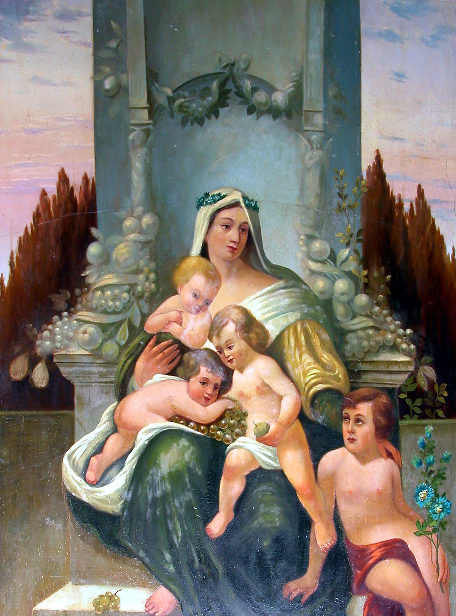 07.06.2004 01309 Dresden-Striesen, Krenkelstraße 7 (GMP: 51.044676,13.774642): Die Mietvilla wurde 1907 von Bauunternehmer Friedrich Carl Uhsen errichtet. Deckengemälde im Entree. Das Haus wurde in den 1990er Jahren aufwendig saniert. [DSCN3675.TIF]20040607300DR.JPG(c)Blobelt